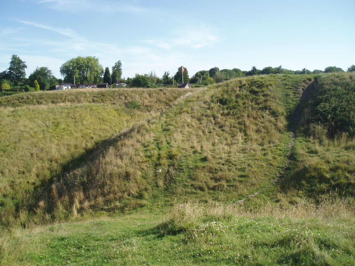 Ørkildborgen i Svendborg